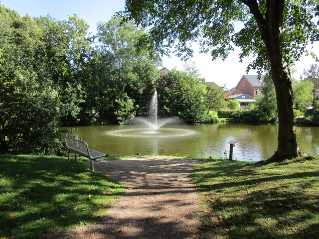 Vaskekule ved Slotsparken i Tøning